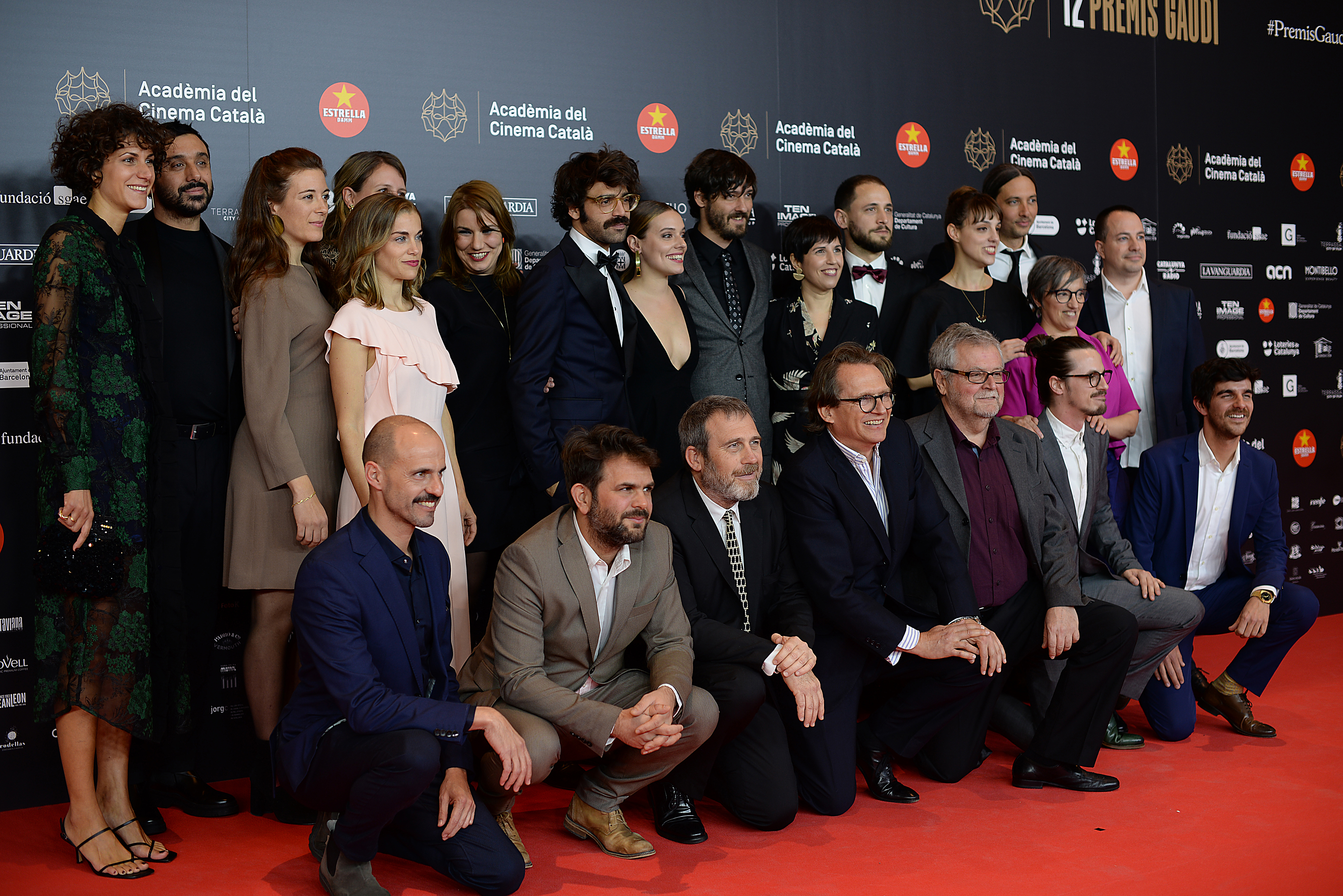 Equip d'Els dies que vindran, XII Premis Gaudí (2020)